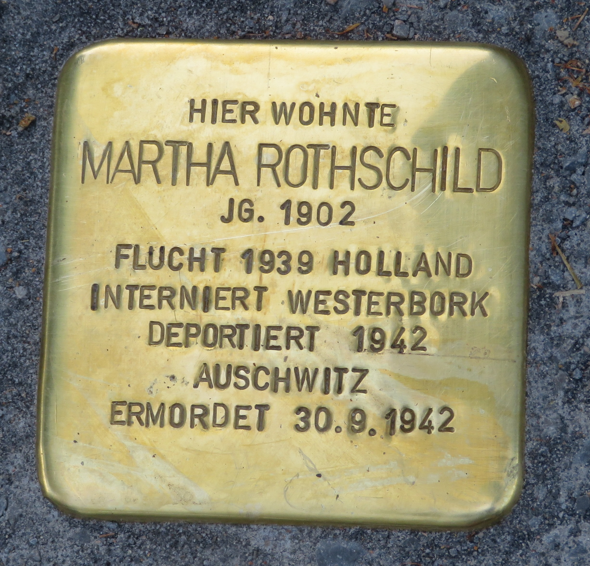 Stolperstein in Heilbronn